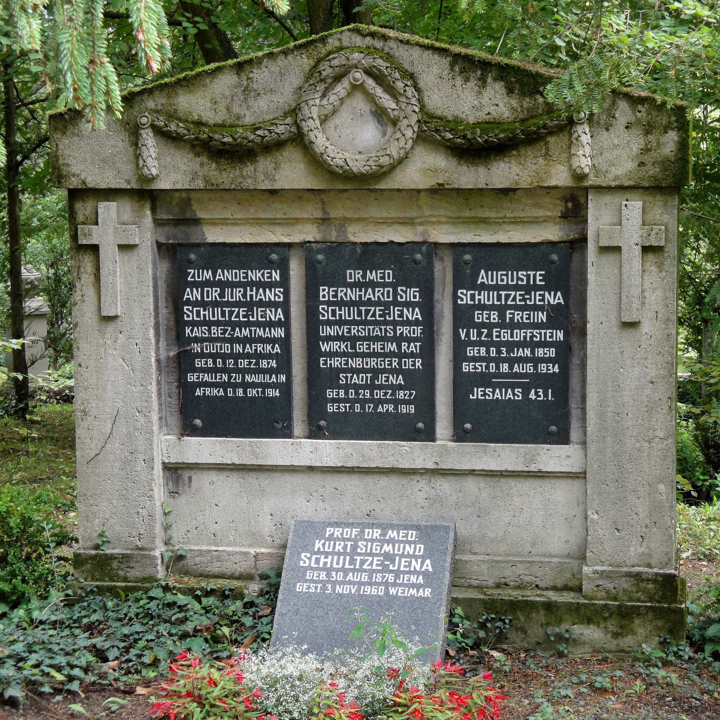 Grab von Bernhard Schultze-Jena auf dem Nordfriedhof in Jena